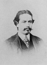 Raffaello Sernesi (1838-1866), photo